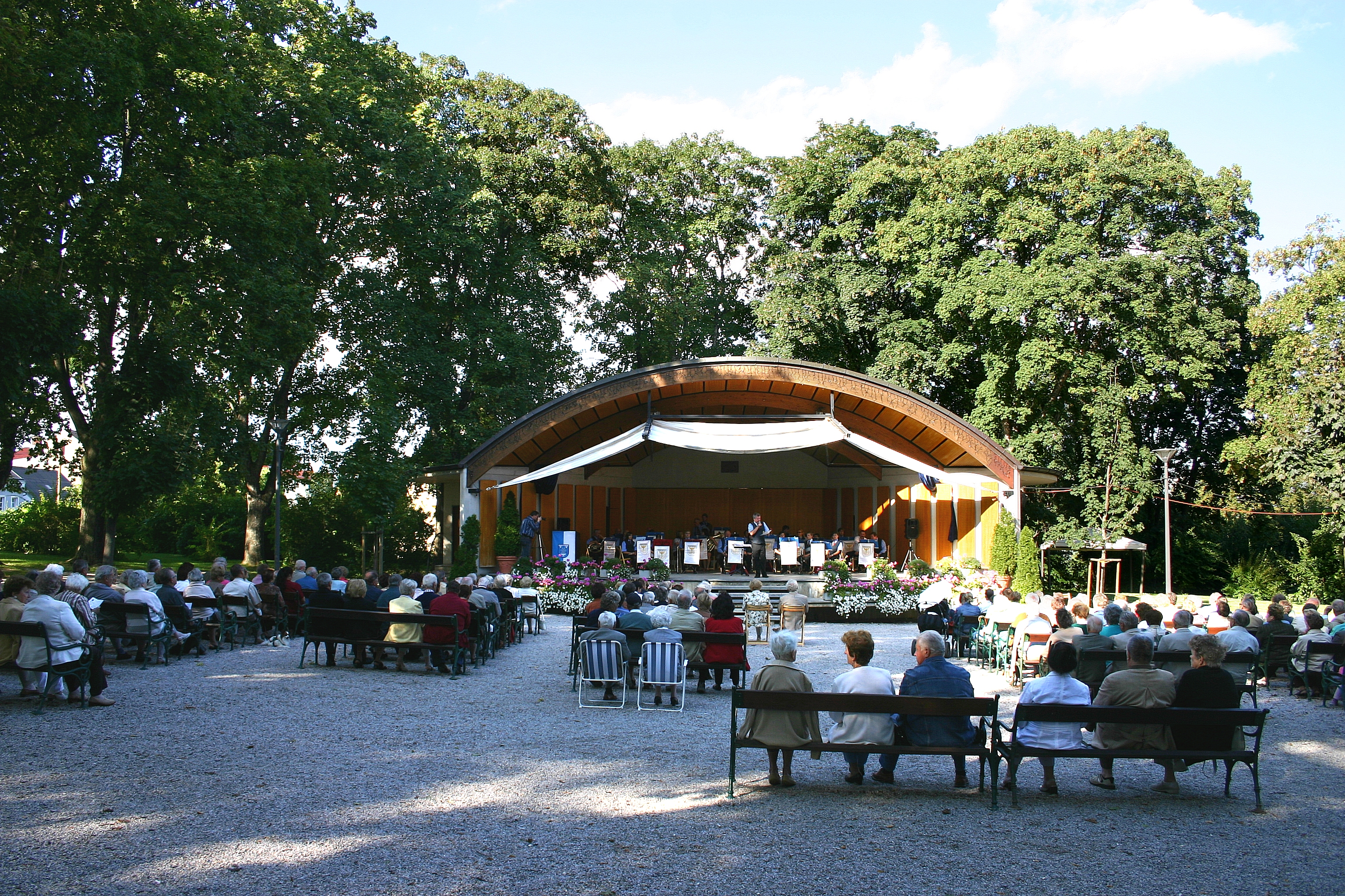 Bad Sauerbrunn Konzert im Kurpark